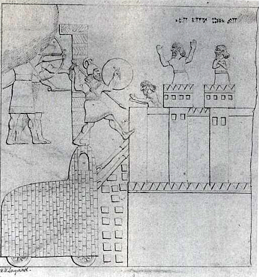 Assédio de Gezer, uma campanha de Esarhaddon (c.681-669 a.C.), mostrando um possível protótipo para o Cavalo de Troia. Reprodução de mural no Palácio do Sudoeste, Nimrod, realizada por Austen Henry Layard.